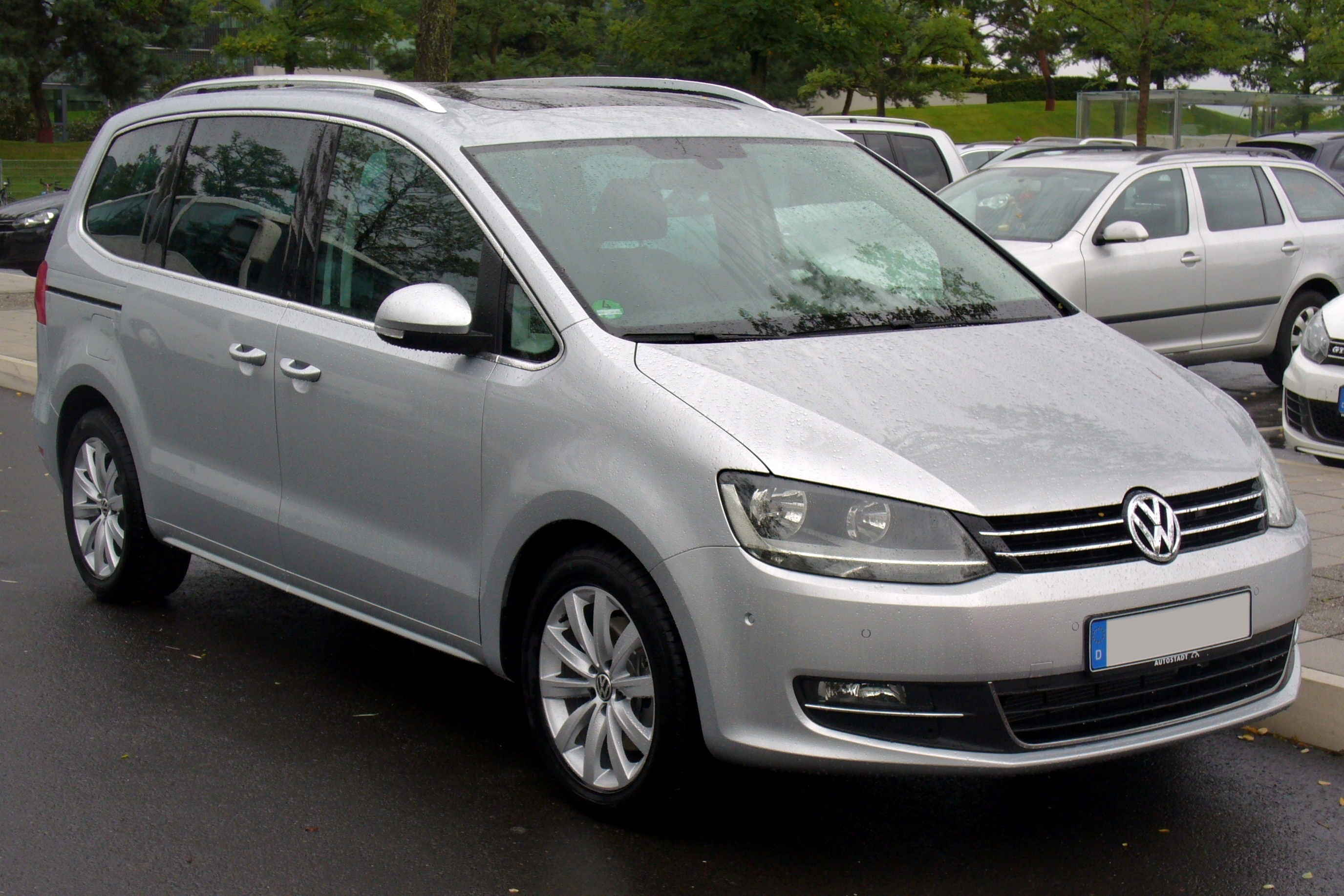 VW Sharan II